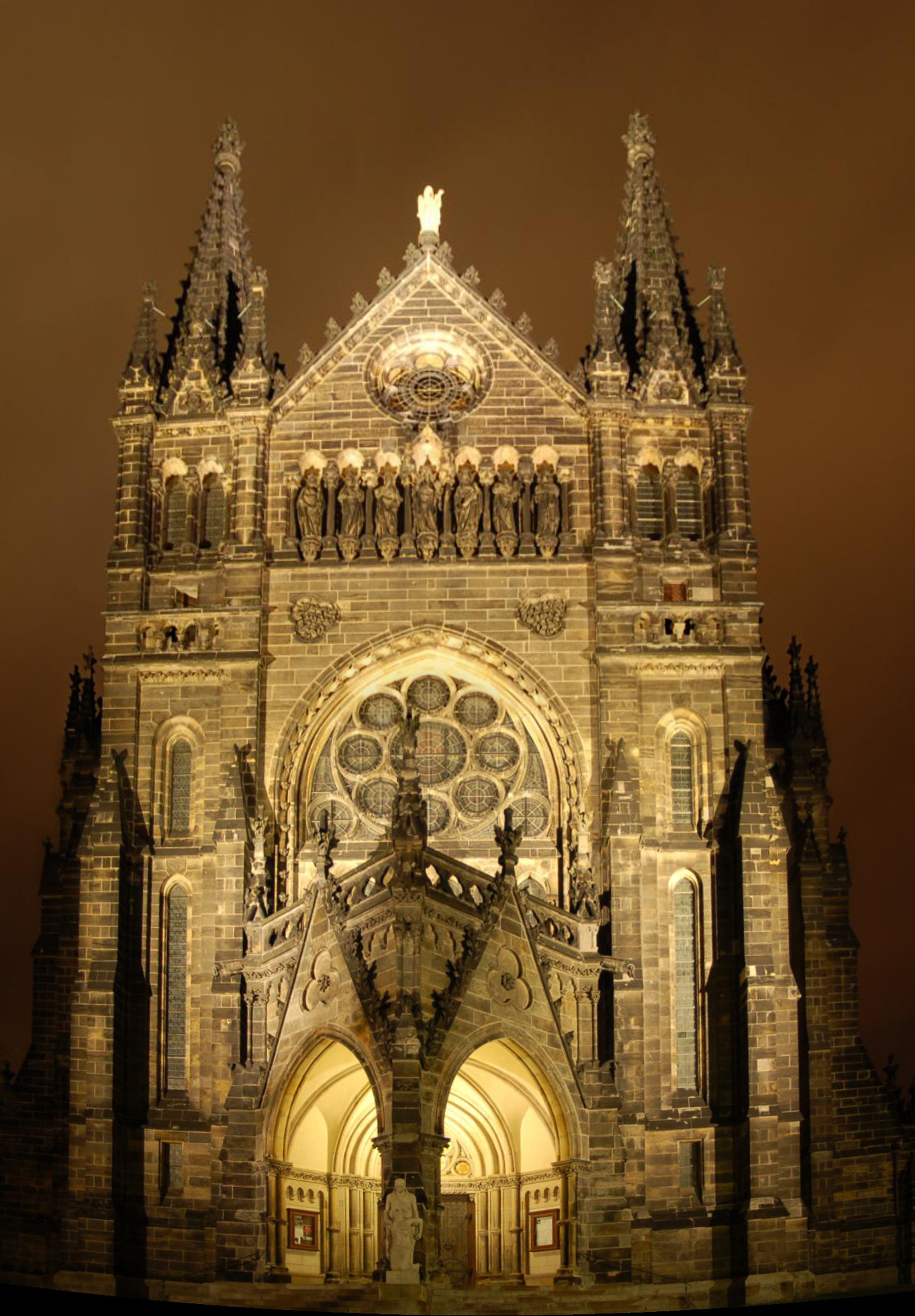 Die Peterskirche in Leipzig